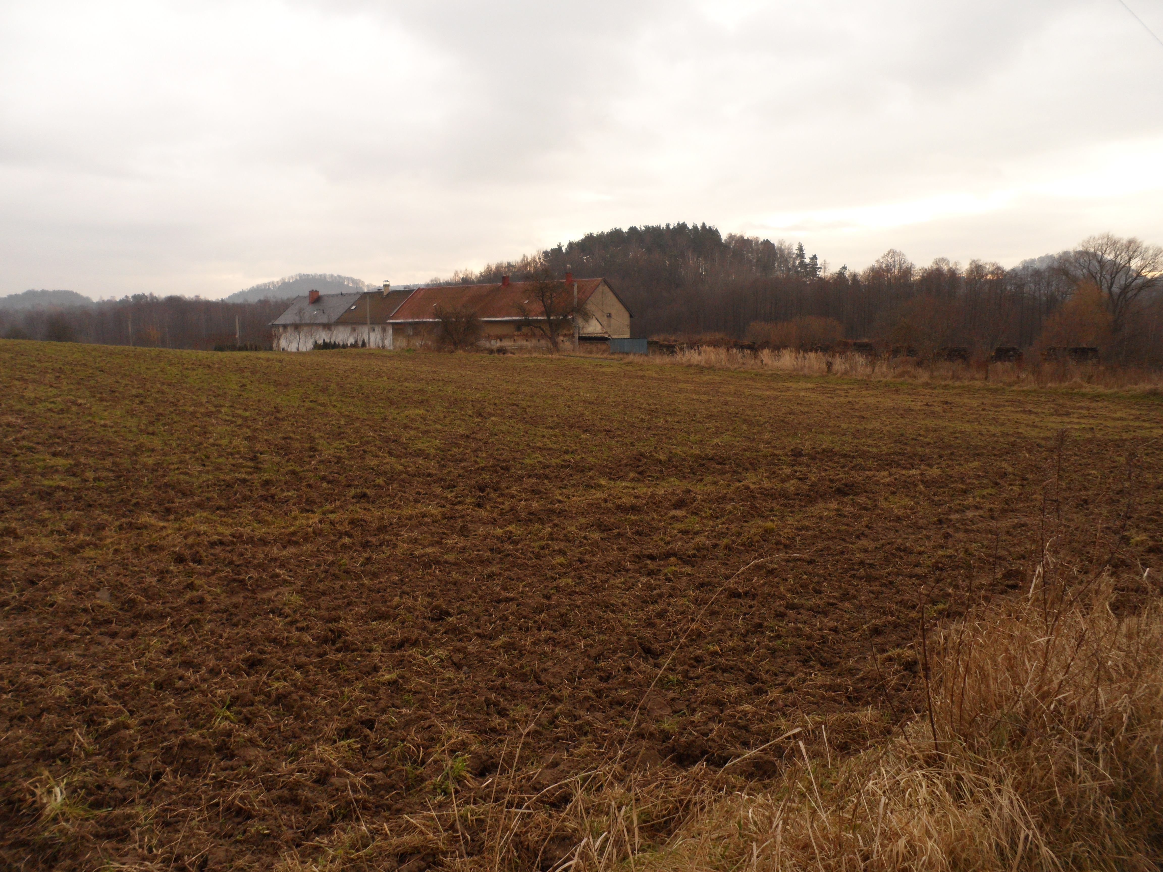 Tvrz, Útěchovice 7, Útěchovice (Hamr na Jezeře).